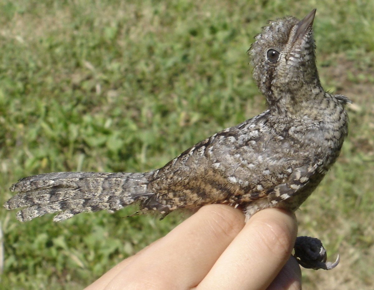 Jynx torquilla young